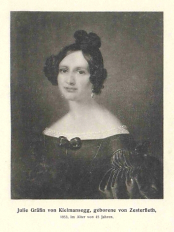 Gräfin Juliane (Julie) v. Kielmansegg, geb. v. Zesterfleth (1808–1888), Letzte ihres Stammes